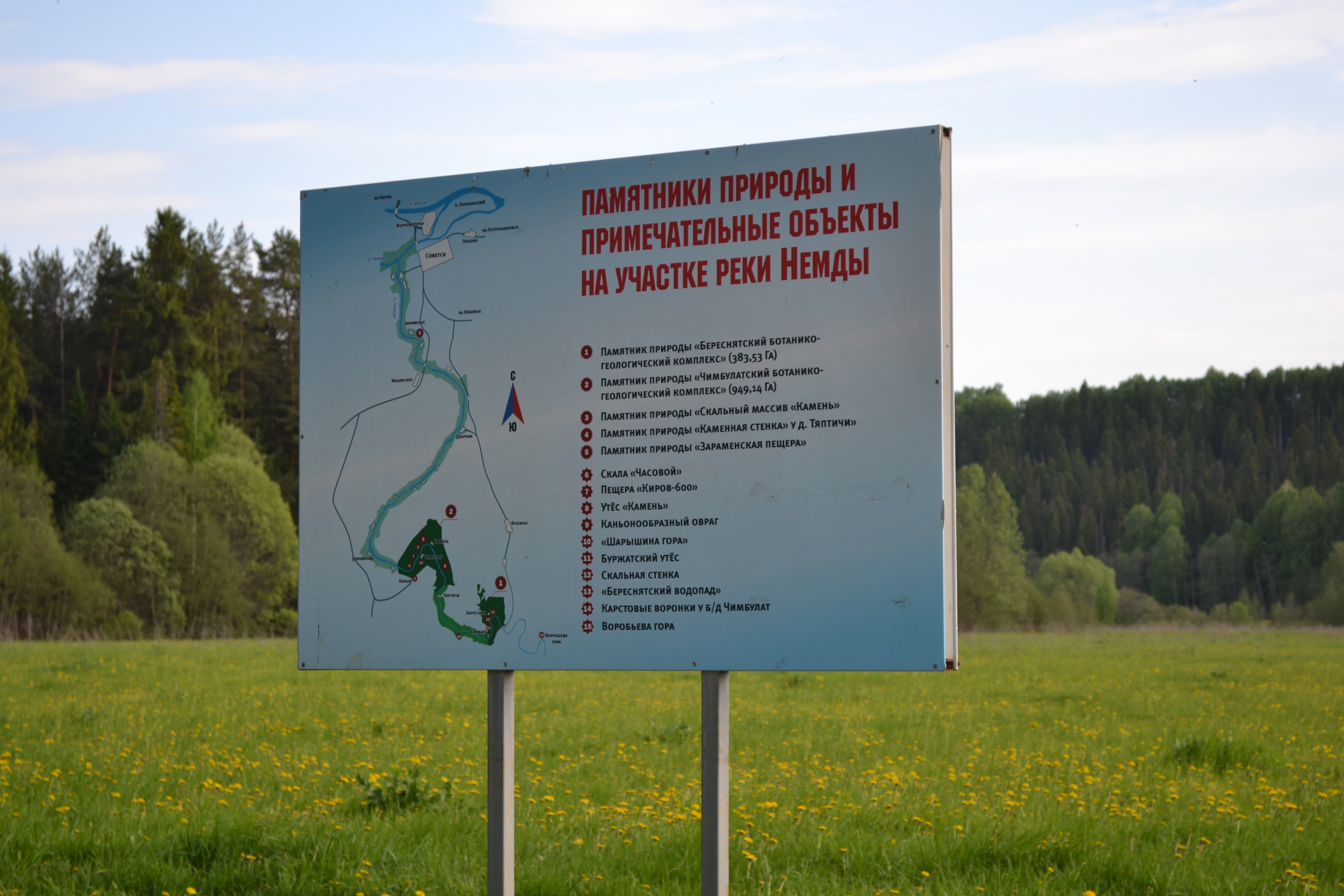 Береснятский ботанико-геологический комплекс, Советский район This image is related to the protected area of Russia number 4310236